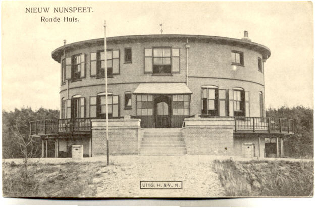 Het Ronde Huis in Nunspeet